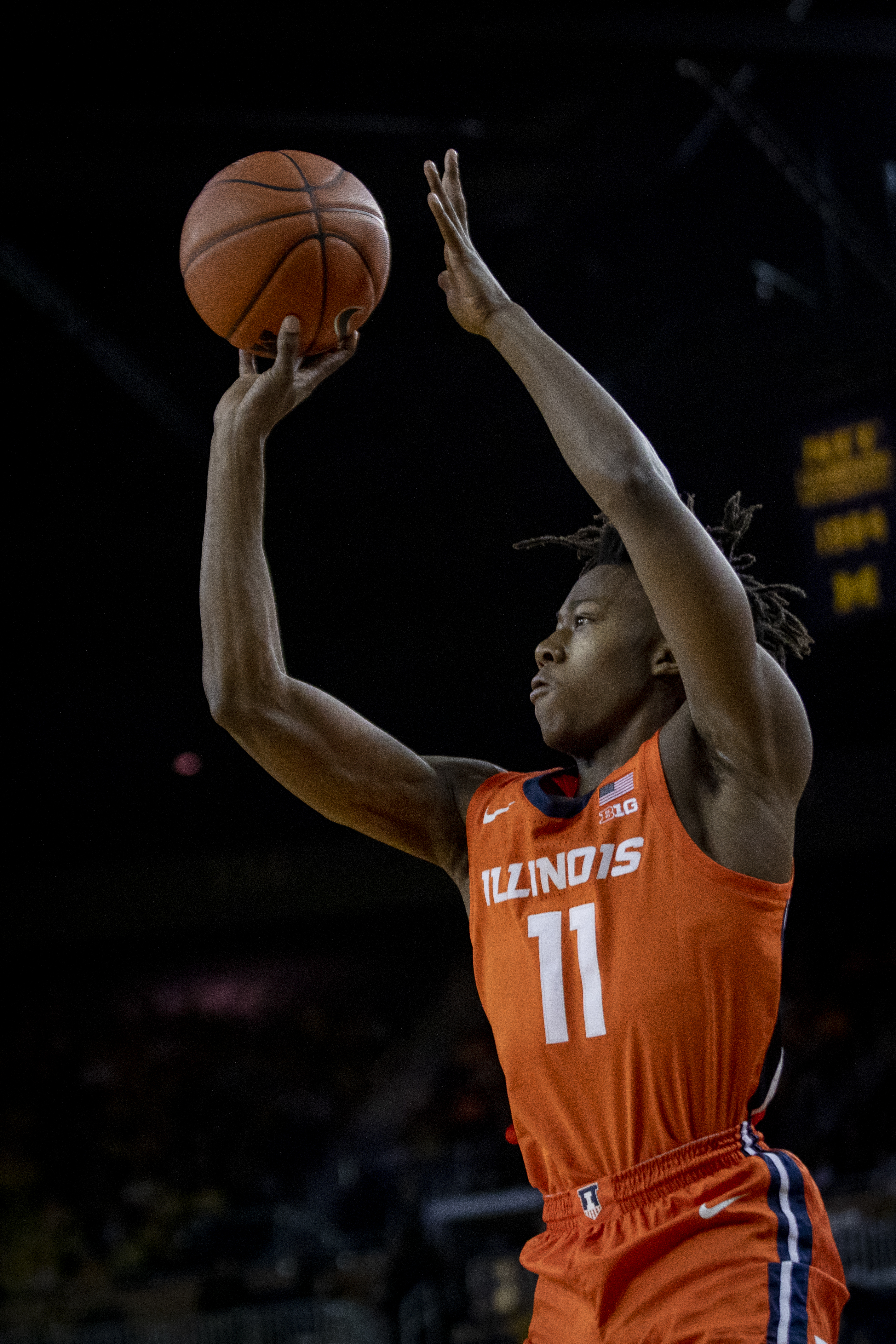 _O6A0673